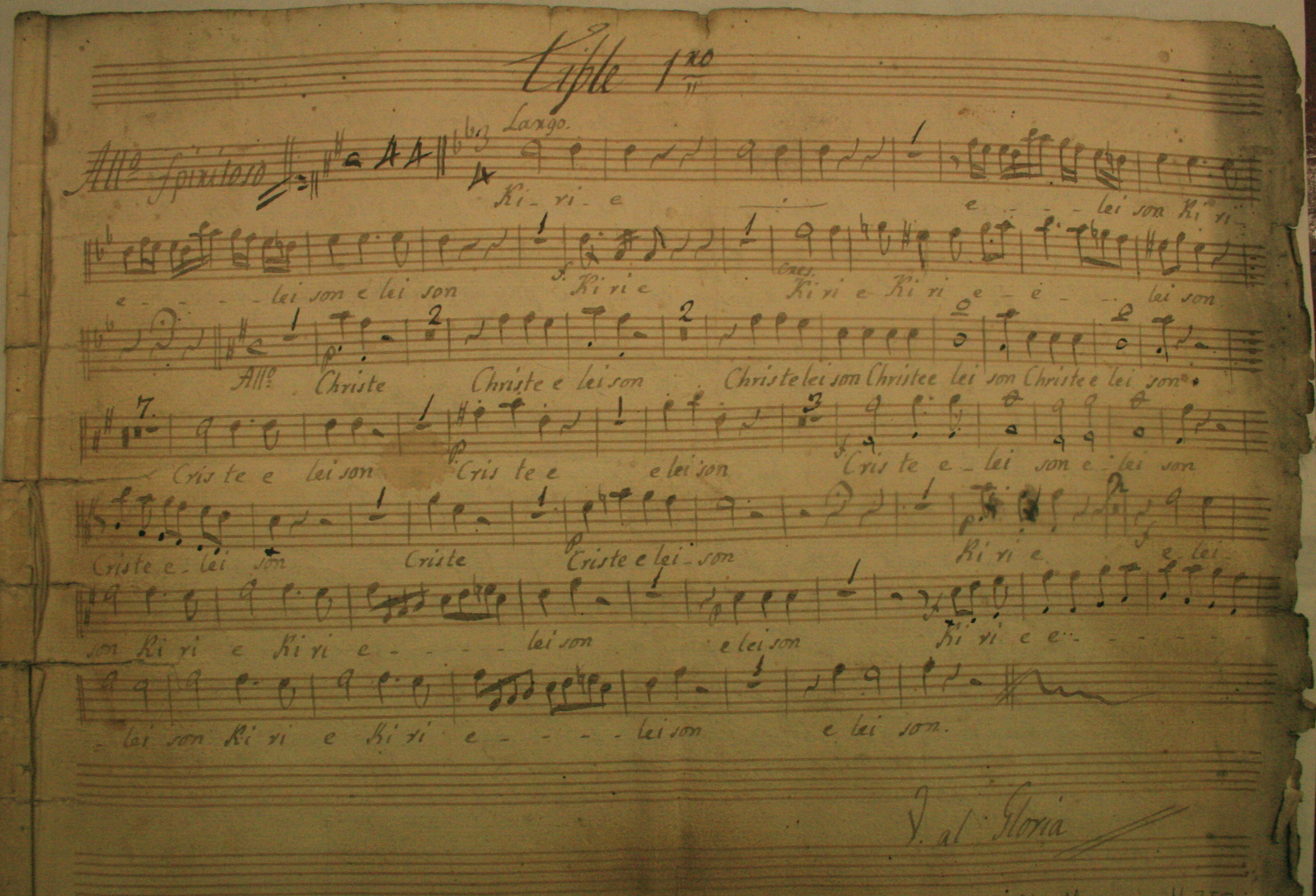 Tiple 1r d'una Missa de Josep Cau.